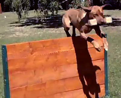 Rhodesian Ridgeback -nez foie, livernose- en entrainement d'obeissance sportive, saut de haie de 1 m avec une haltere de 650 grammes, Dexter m'tanami of Wolwekraal